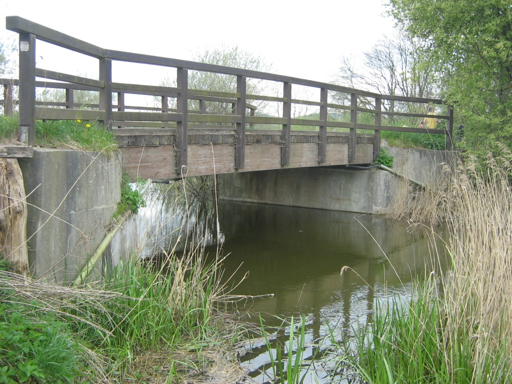 Der Dahmer Kanal entwässert den Malchiner See zur Ostpeene bei Malchin. Er fließt in einem breiten Stromtal zwischen den Bergen der Mecklenburger Schweiz und ist der kanalisierte Verlauf eines Flusses des Peenesystems (einer der kleinen Zuflüsse des Malchiner Sees heißt „Westpeene“). Der Dahmer Kanal ist für Boote schiffbar.